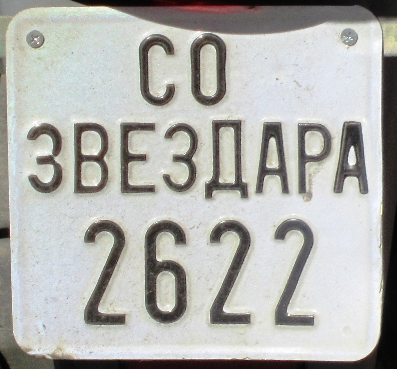 Servië kentekeplaat langzaam verkeer oud